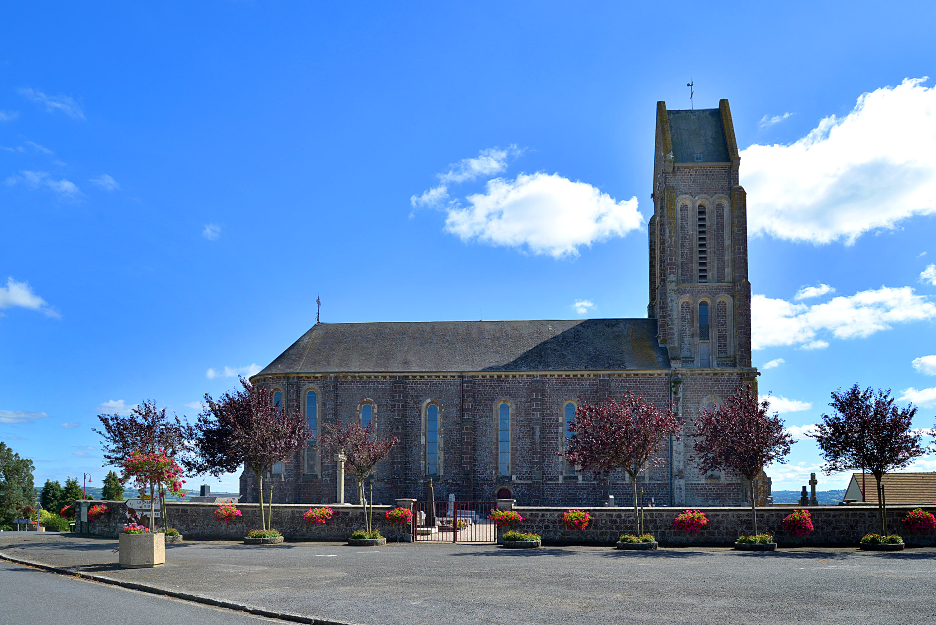 Troisgots (Manche)